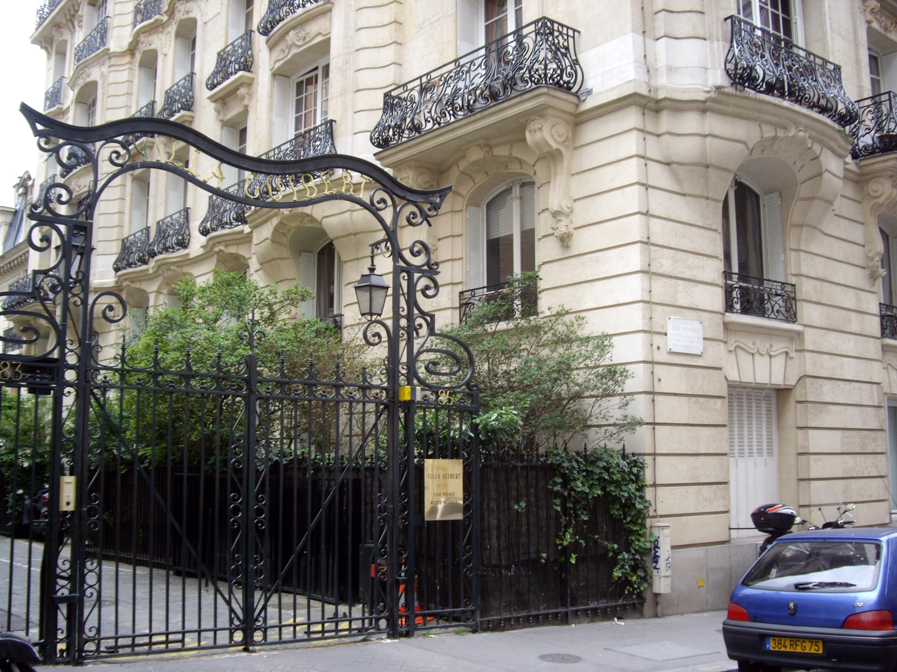 Entrée de la villa Guibert au n° 83 de la rue de la Tour, Paris 16e, et dernière demeure du poète Jean Richepin (1849-1926) à l'angle du n° 85.